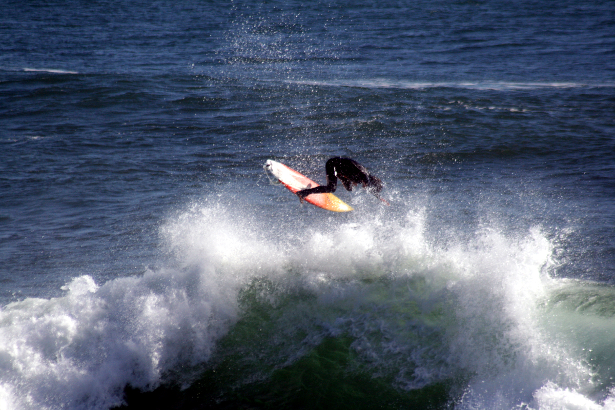 California surfer in Santa Cruz